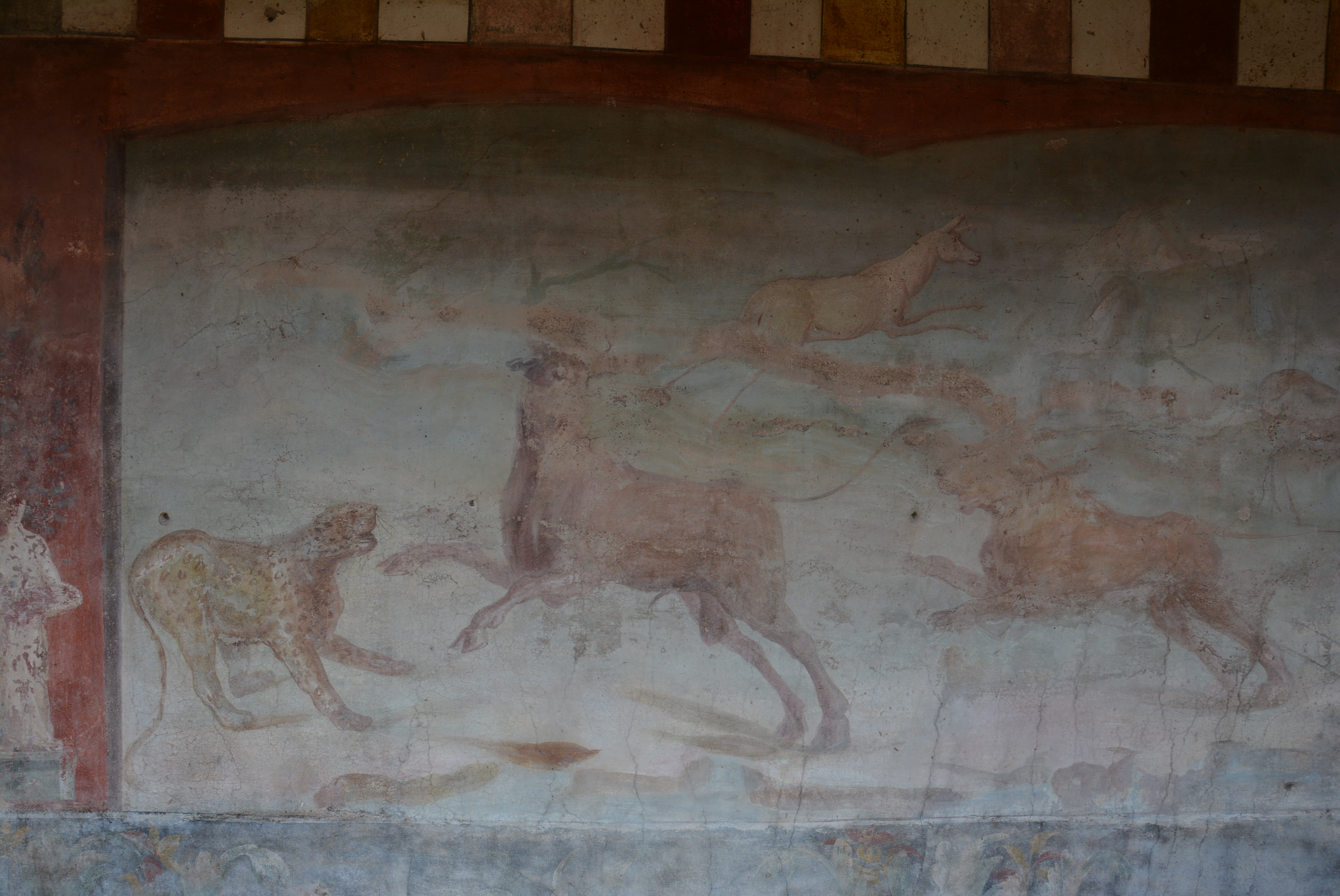 Casa di Marco Lucrezio Frontone - MIBACT This is a photo of a monument which is part of cultural heritage of Italy.